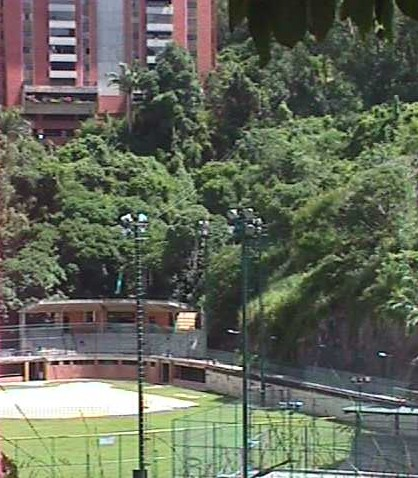 PDVSA-CIED (area metropolitana de Caracas) campos deportivos